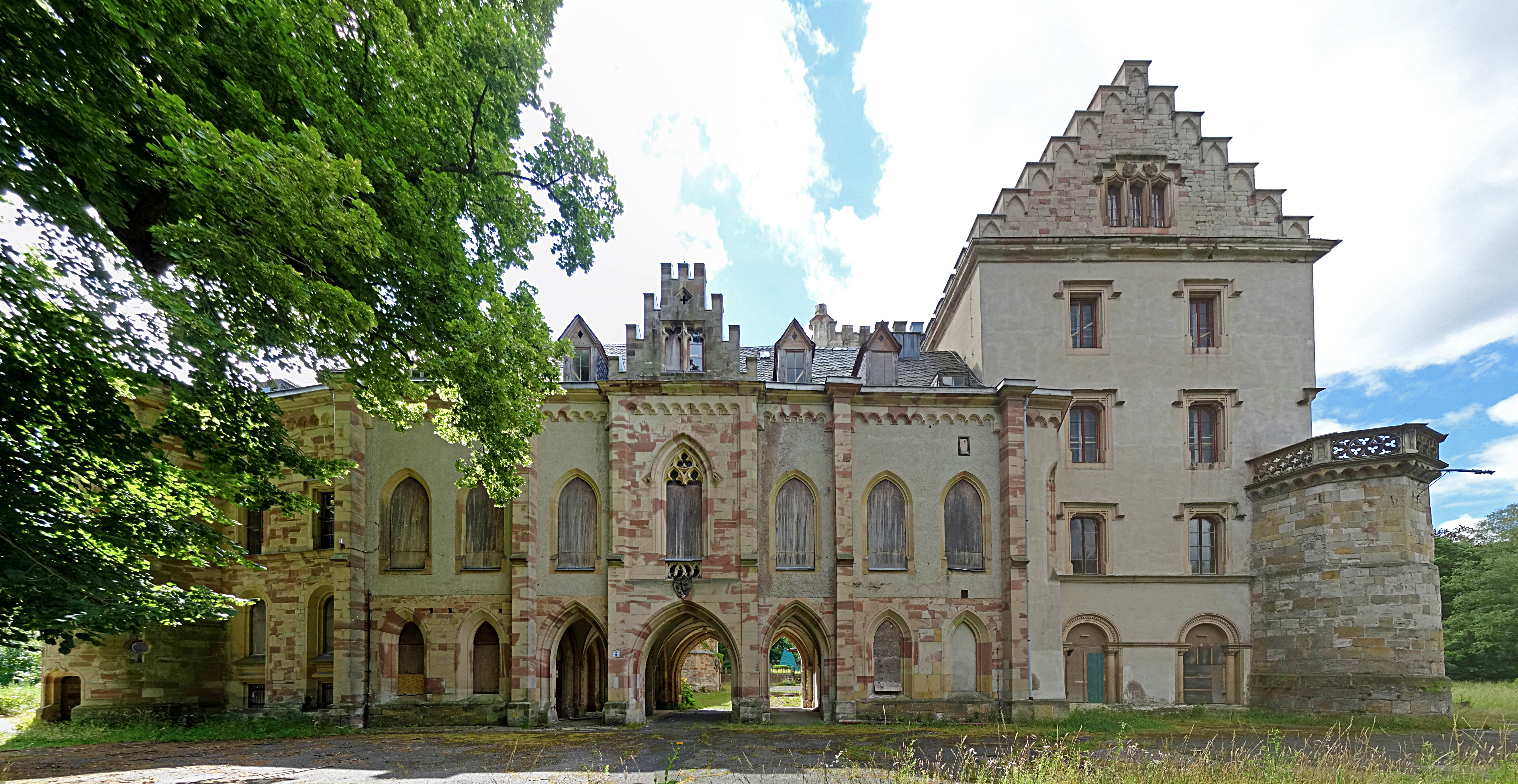 Schloss Reinhardsbrunn von Norden 2020